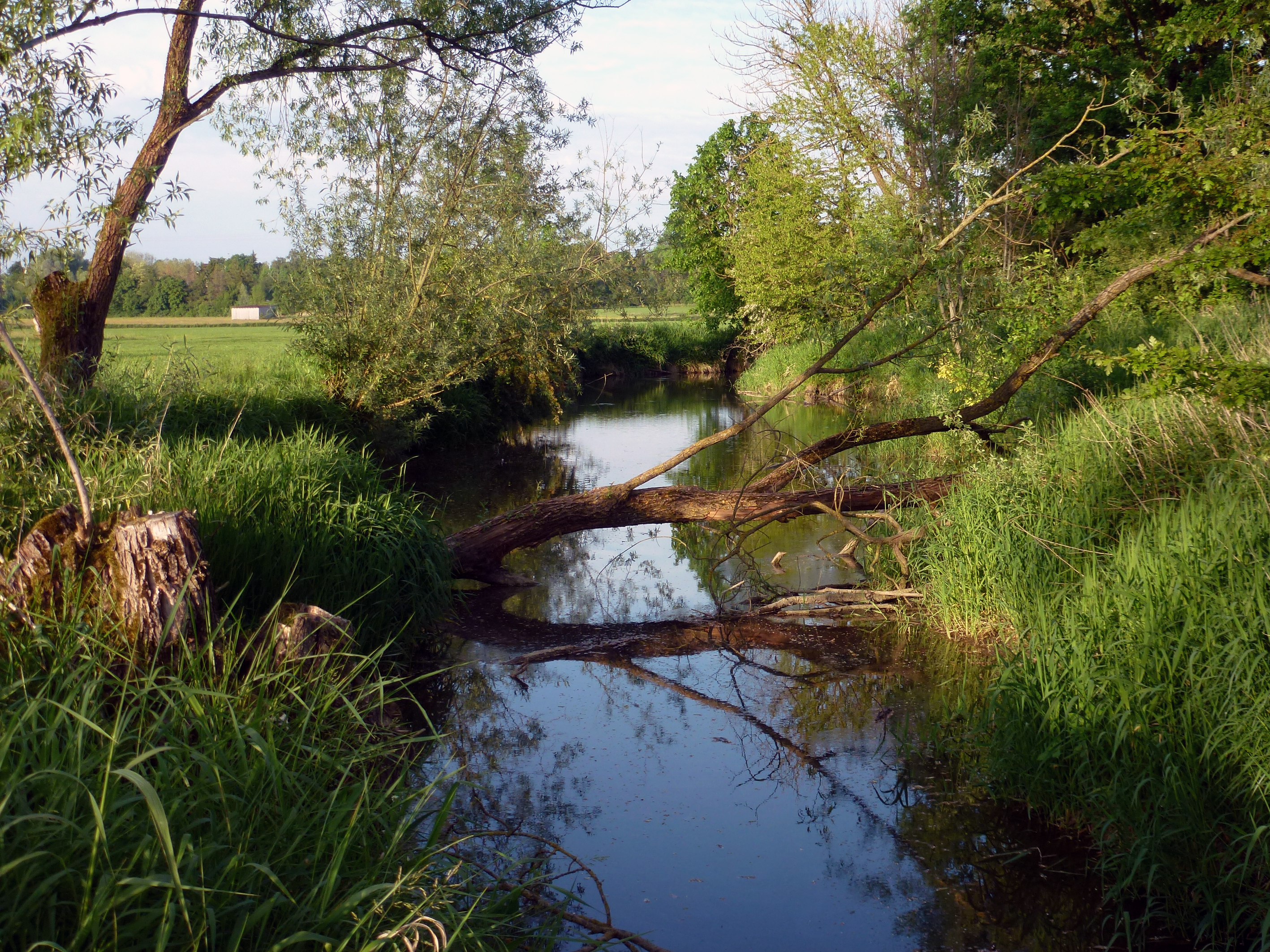 Neusäß zwischen Westheim und Ottmarshausen, Schmutteraltwasser